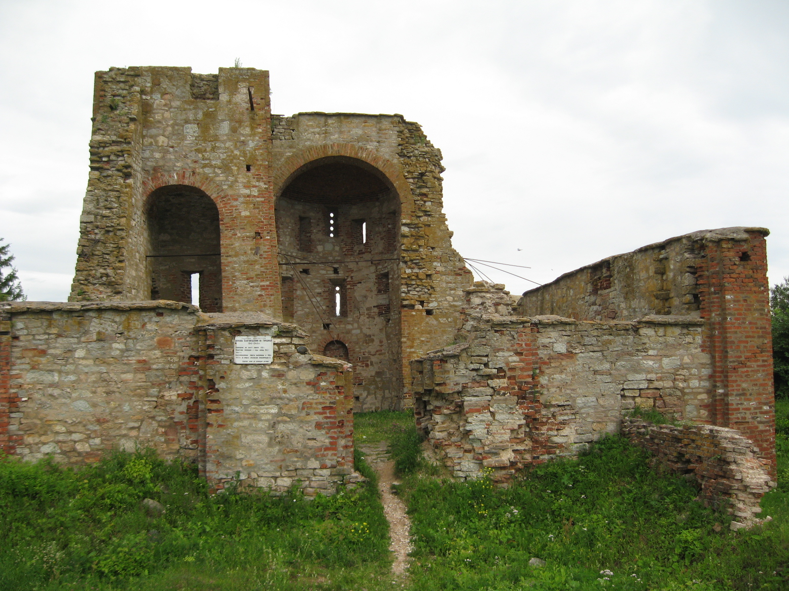 Руины церкви благовещения на Городище в окрестностях Великого Новгорода. 1103 год, XIV век.